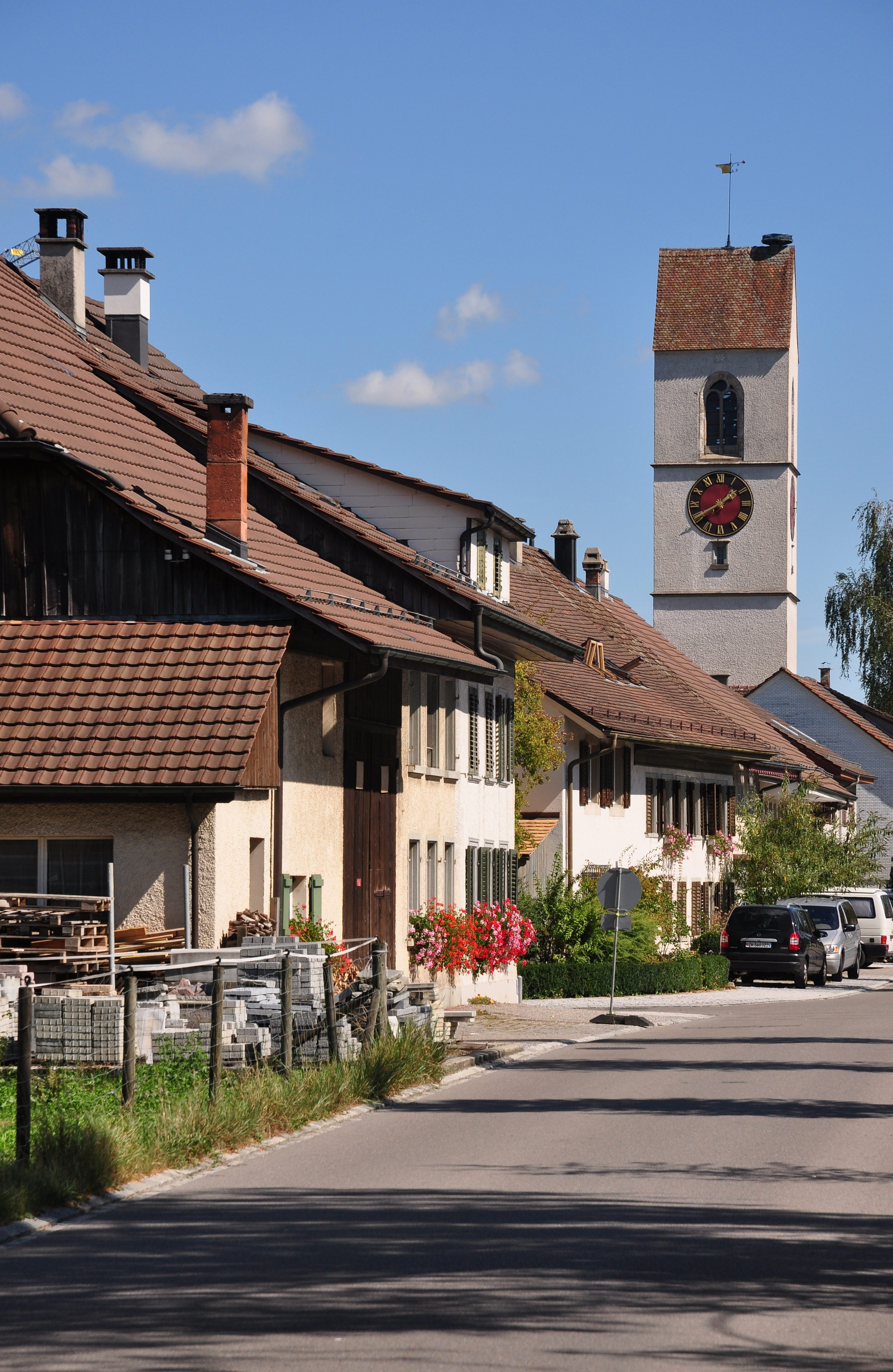 Dorfstrasse in Wiesendangen (Switzerland)